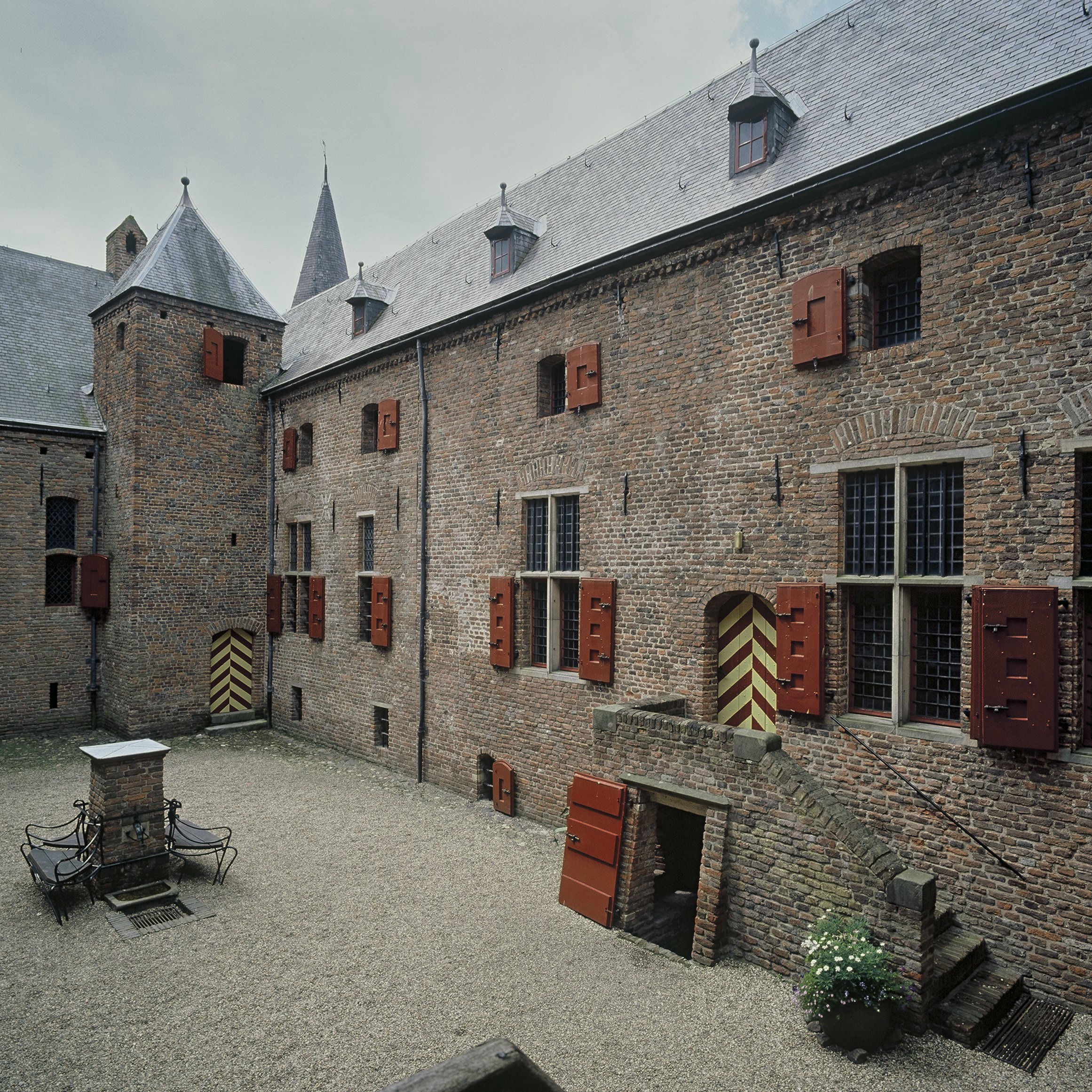 Kasteel Hernen: Overzicht van de binnenplaats met zicht op de westvleugel (opmerking: Gefotografeerd voor het boek "Geldersche Kasteelen" door J.C. Bierens de Haan en J.R. Jas)